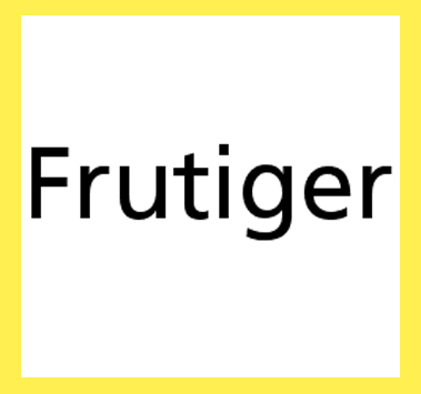 Exemple de Frutiger 55 roman